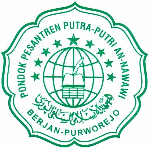 Logo Pondok Pesantren An-Nawawi Berjan Purworejo